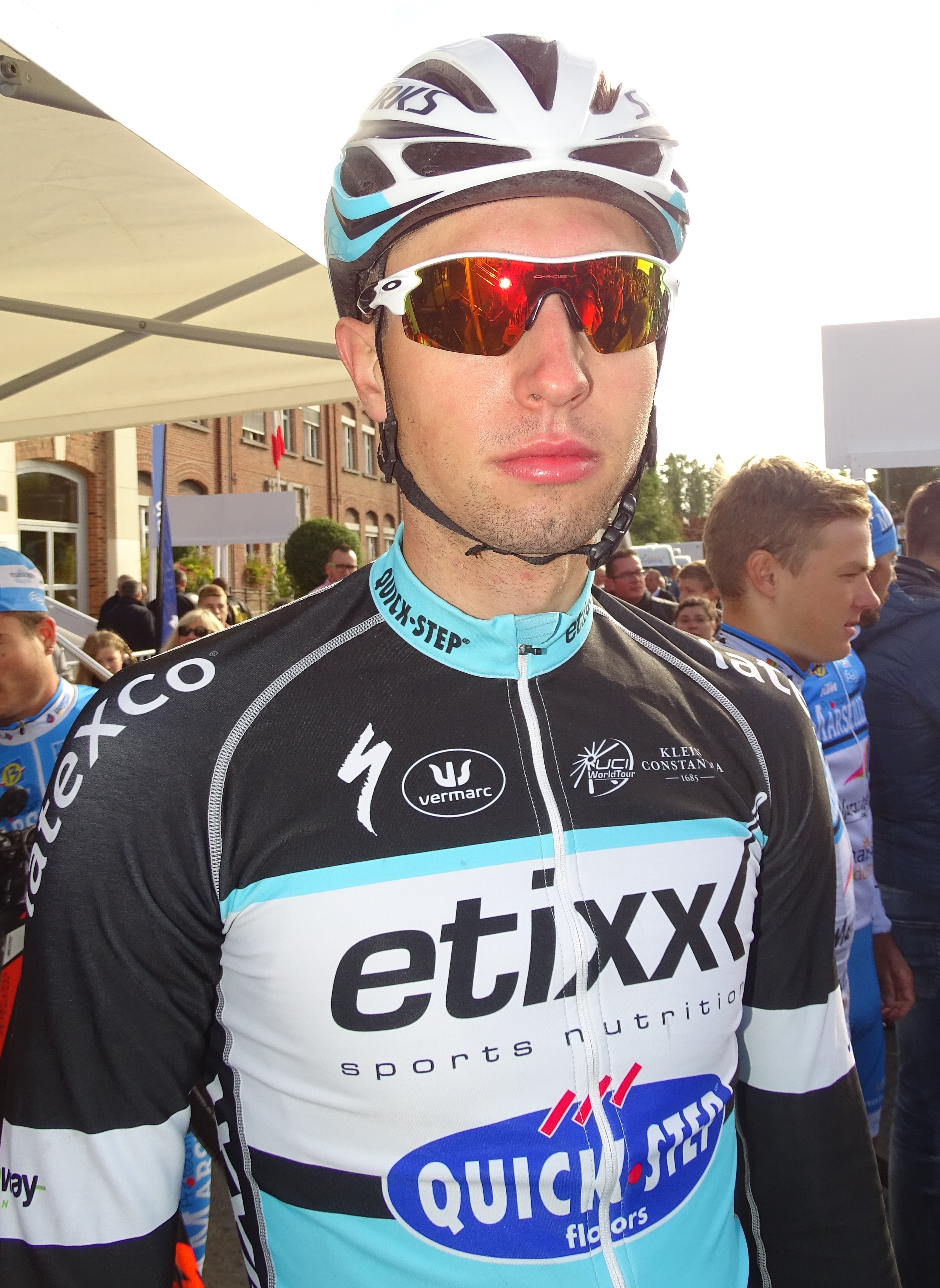 Reportage réalisé le dimanche 6 septembre à l'occasion du départ et de l'arrivée du Grand Prix de Fourmies 2015 à Fourmies, Nord-Pas-de-Calais, France.